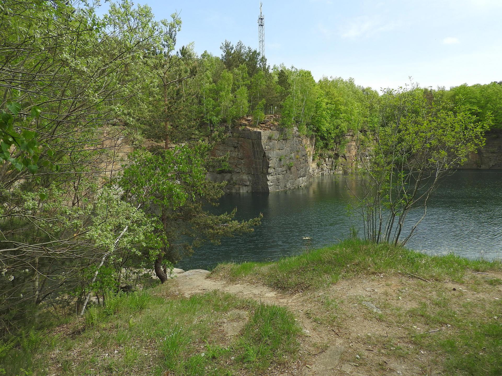 Schauanlage und Museum der Granitindustrie, Haselbachtal/Häslich, 30.04.2018